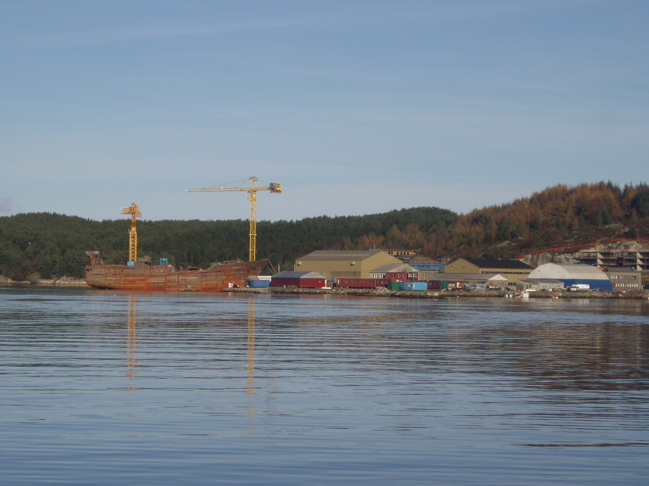 Fitjar Mekaniske Verksted - Fitjar Shipyard